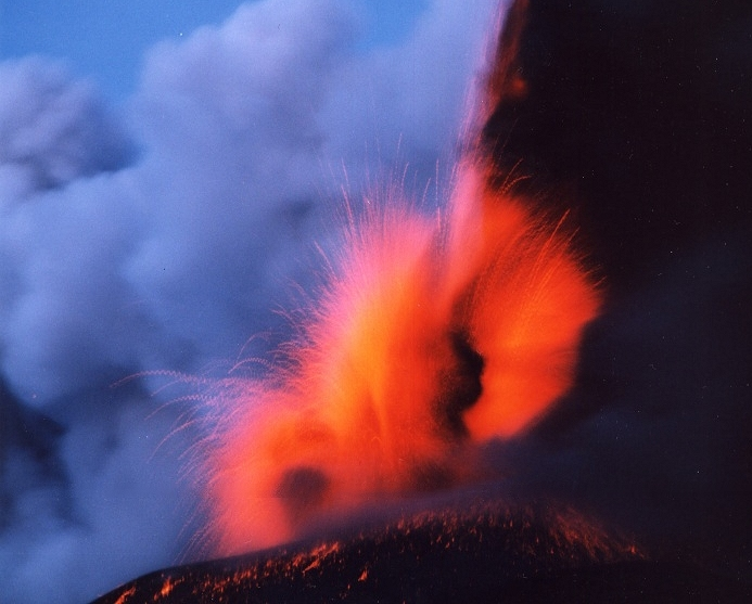 Eruption Etna 2002